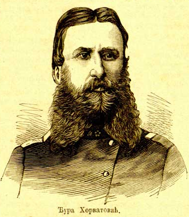 Đura Horvatović, Korpskommandeur von der Banja